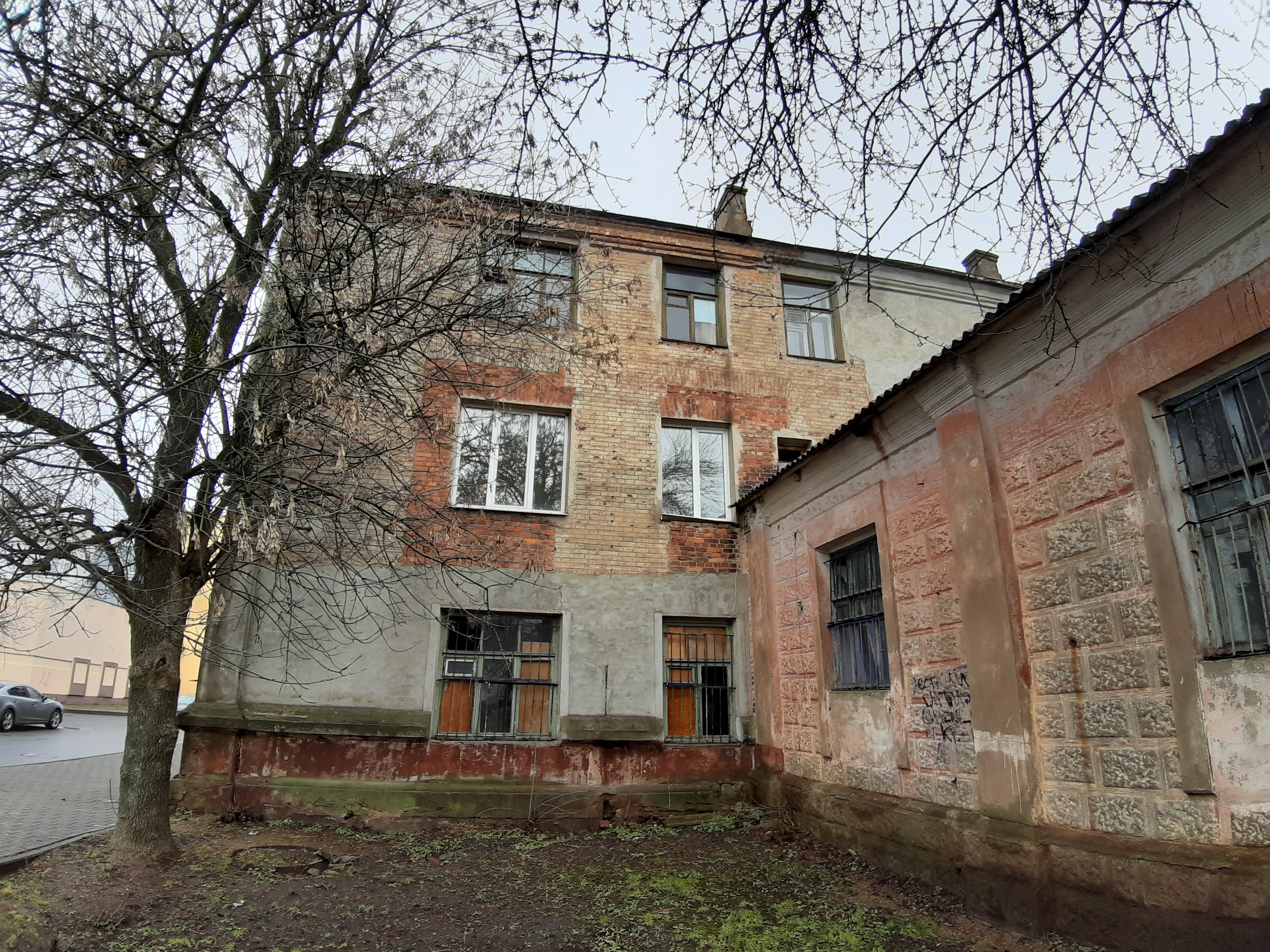 Магілёў. Каля манежа і першай электрастанцыі